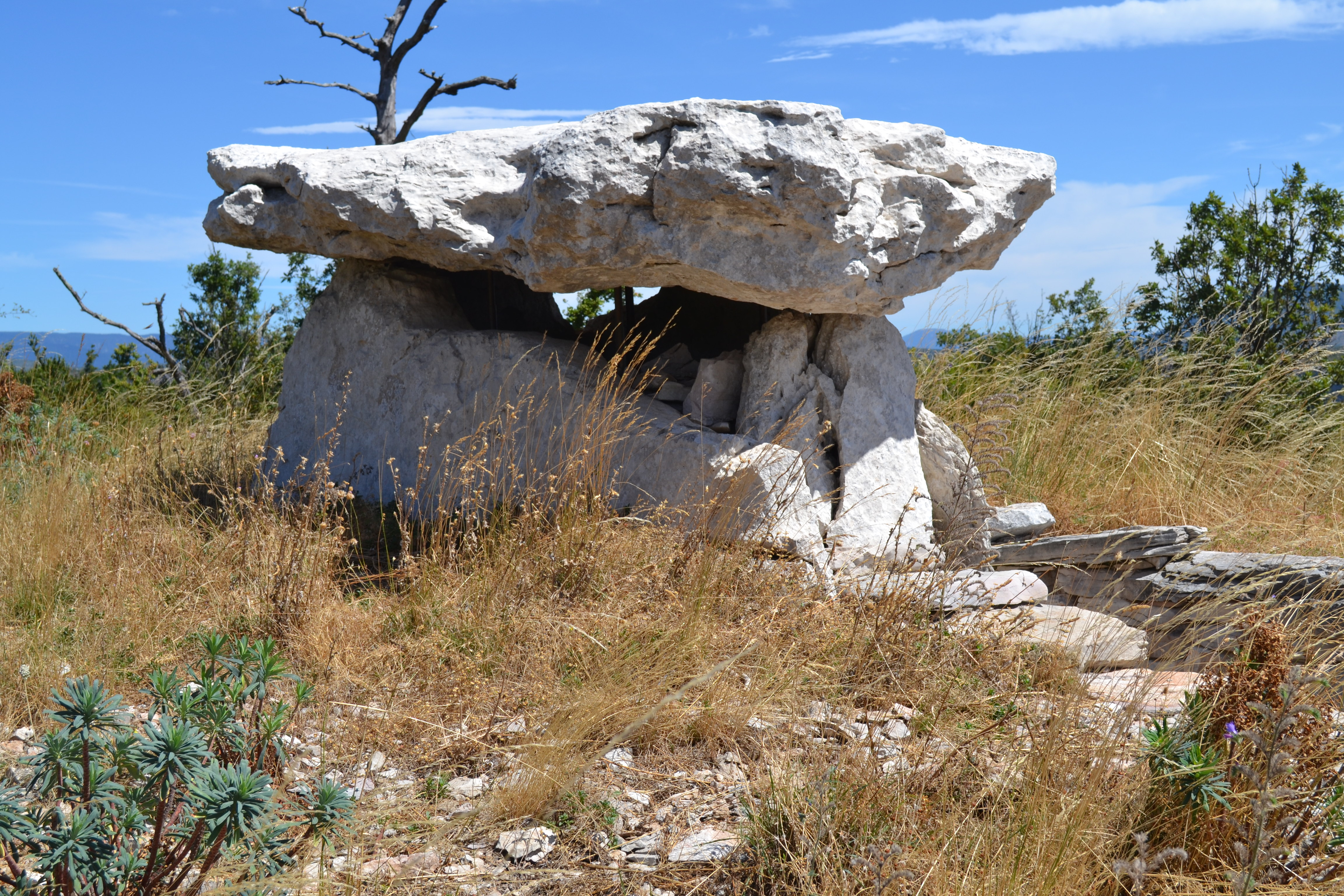 Dolmen de la Prunarède n°2, Saint-Maurice-Navacelles, Hérault, France